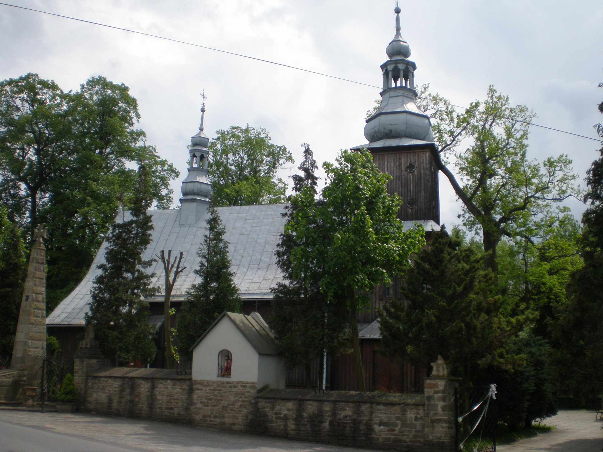 kościół drewniany pw. św. Jana Ewangelisty wraz z otoczeniem w granicach ogrodzenia